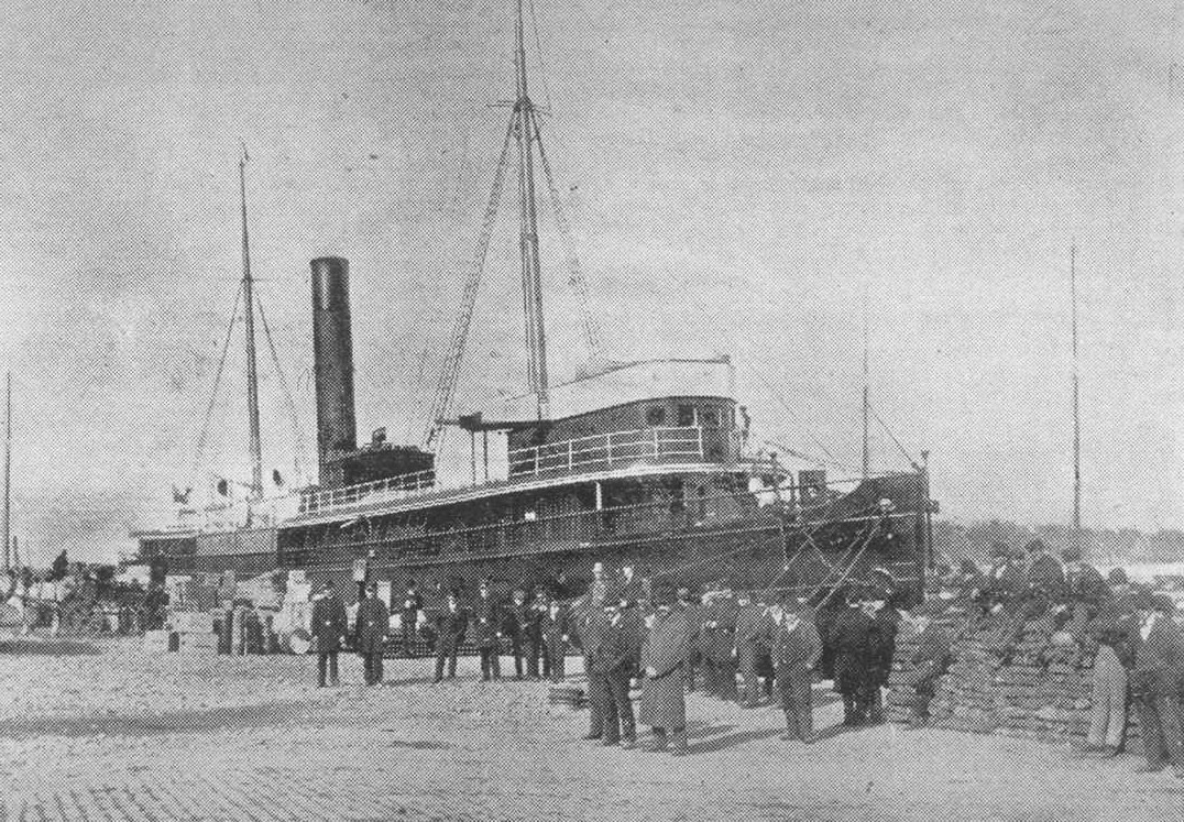 Photographie du navire autour duquel se déroule la grève des débardeurs, Montreal, Mai 1903